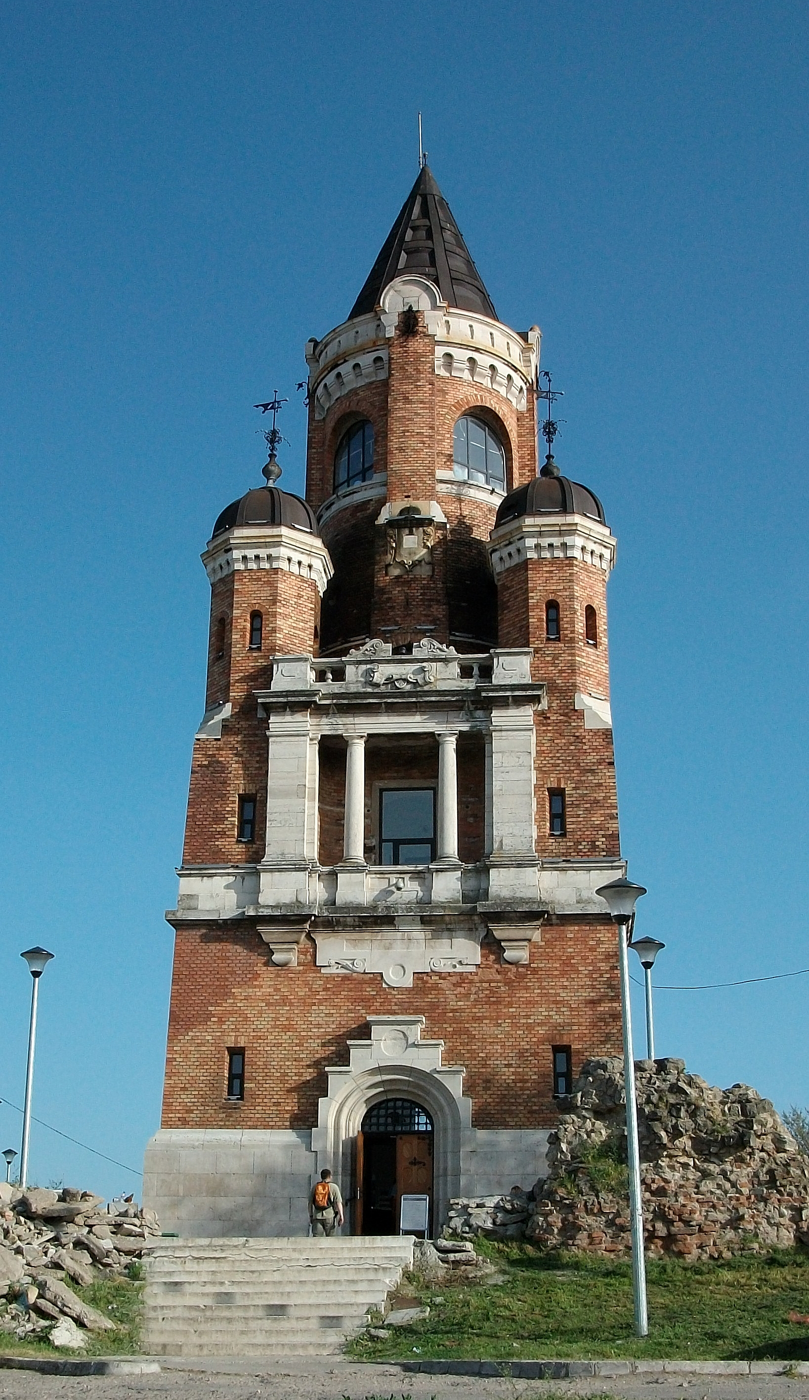 Kula Sibinjanin Janka, Belgrad (Serbien)